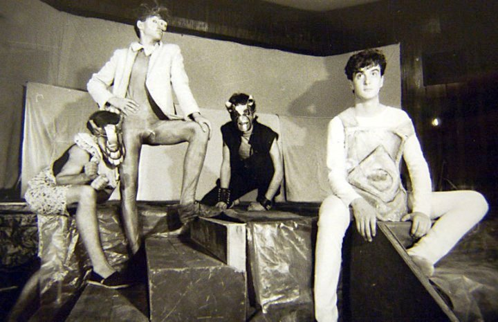 спектакъл: "Шантав диамант" по текстове на Пинк Флойд адаптация: Марио Спасов режисьор: Георги Врабчев